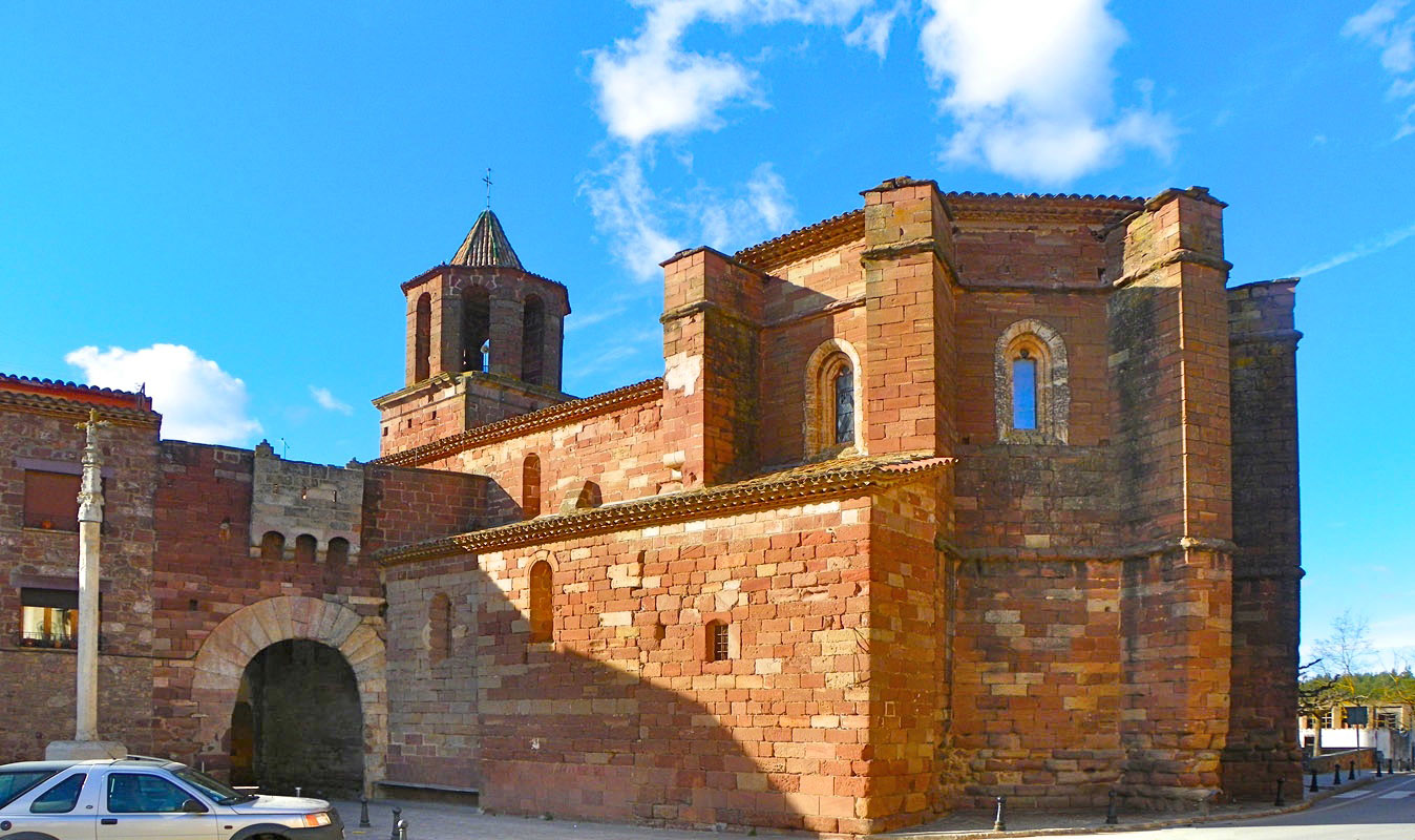 Portal i Església de pedra roja a Prades